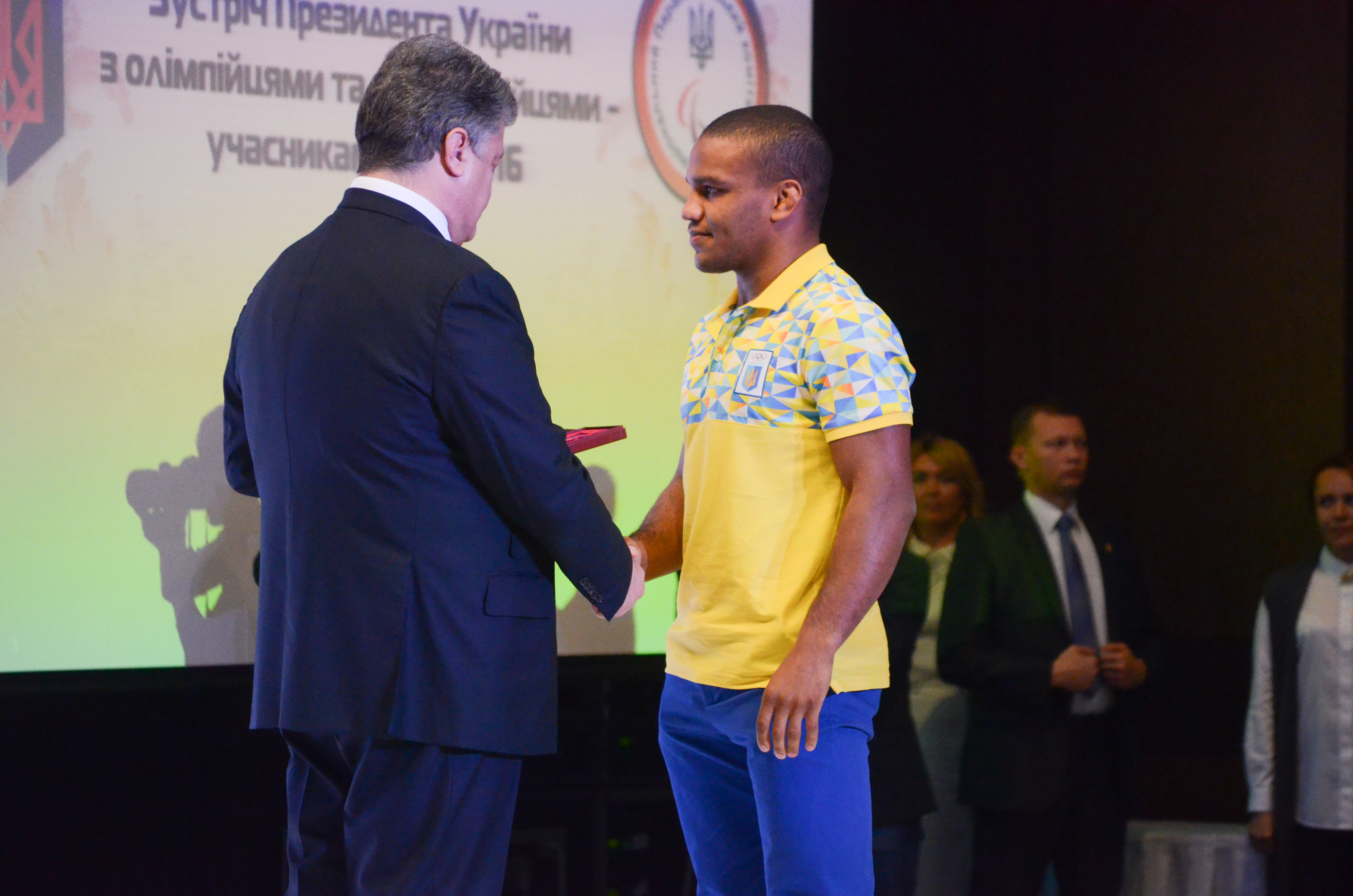 Зустріч Президента України з олімпійцями та паралімпійцями — учасниками Ріо-2016.